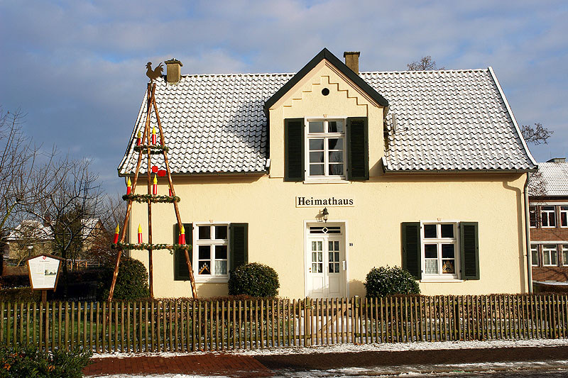 Das Heimathaus/Heimatmuseum im westmünsterländischen Erle im Winter